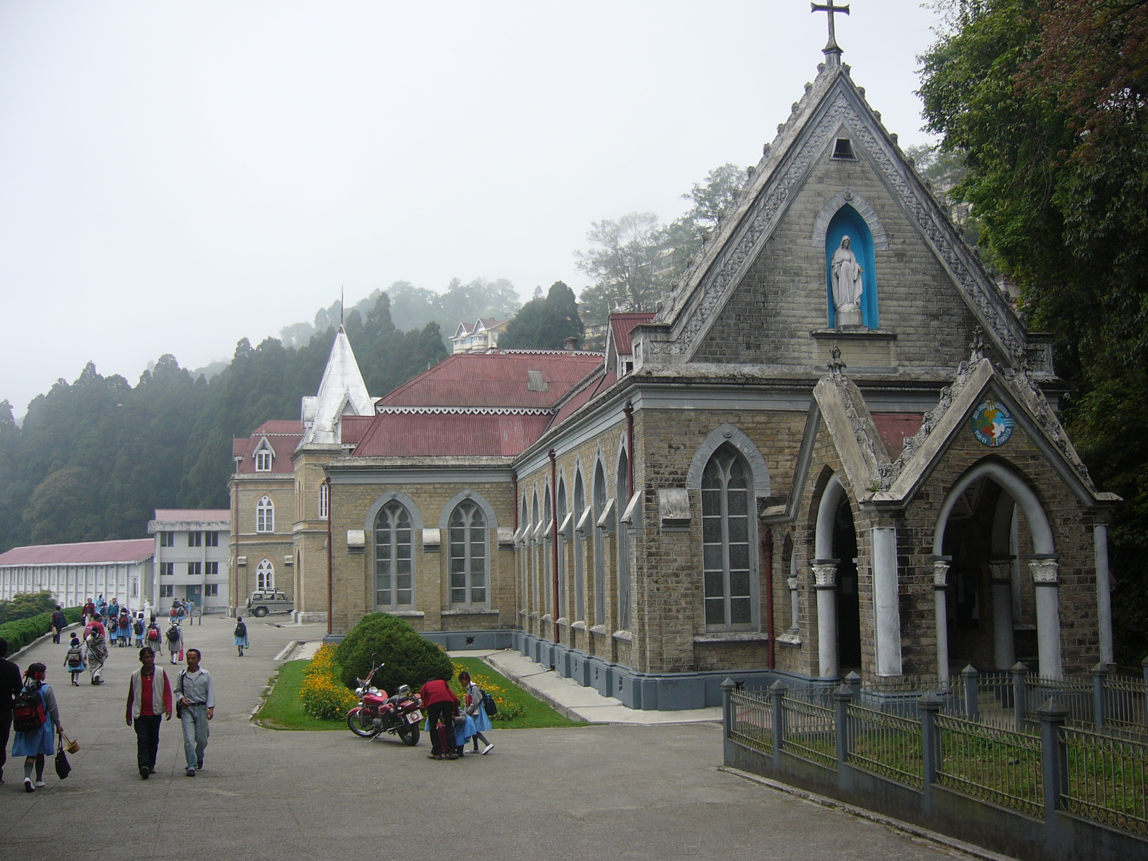 Loreto Convent Darjeeling West Bengal India